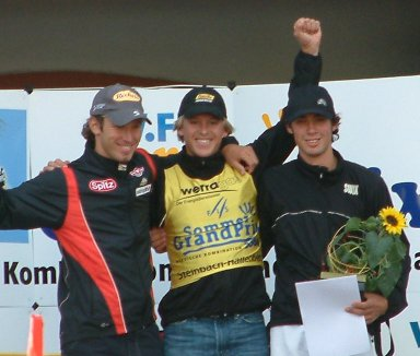 Podium Sommer Grand Prix 2004 (Bieler, Lodwick, Spillane)